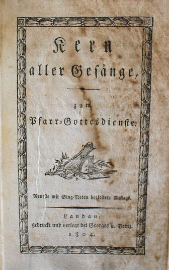 Titelblatt Gesangbuch, verausgabt vom Speyerer Bischofs-Provikar und Stadtpfarrer Christoph Mähler (1736-1814)